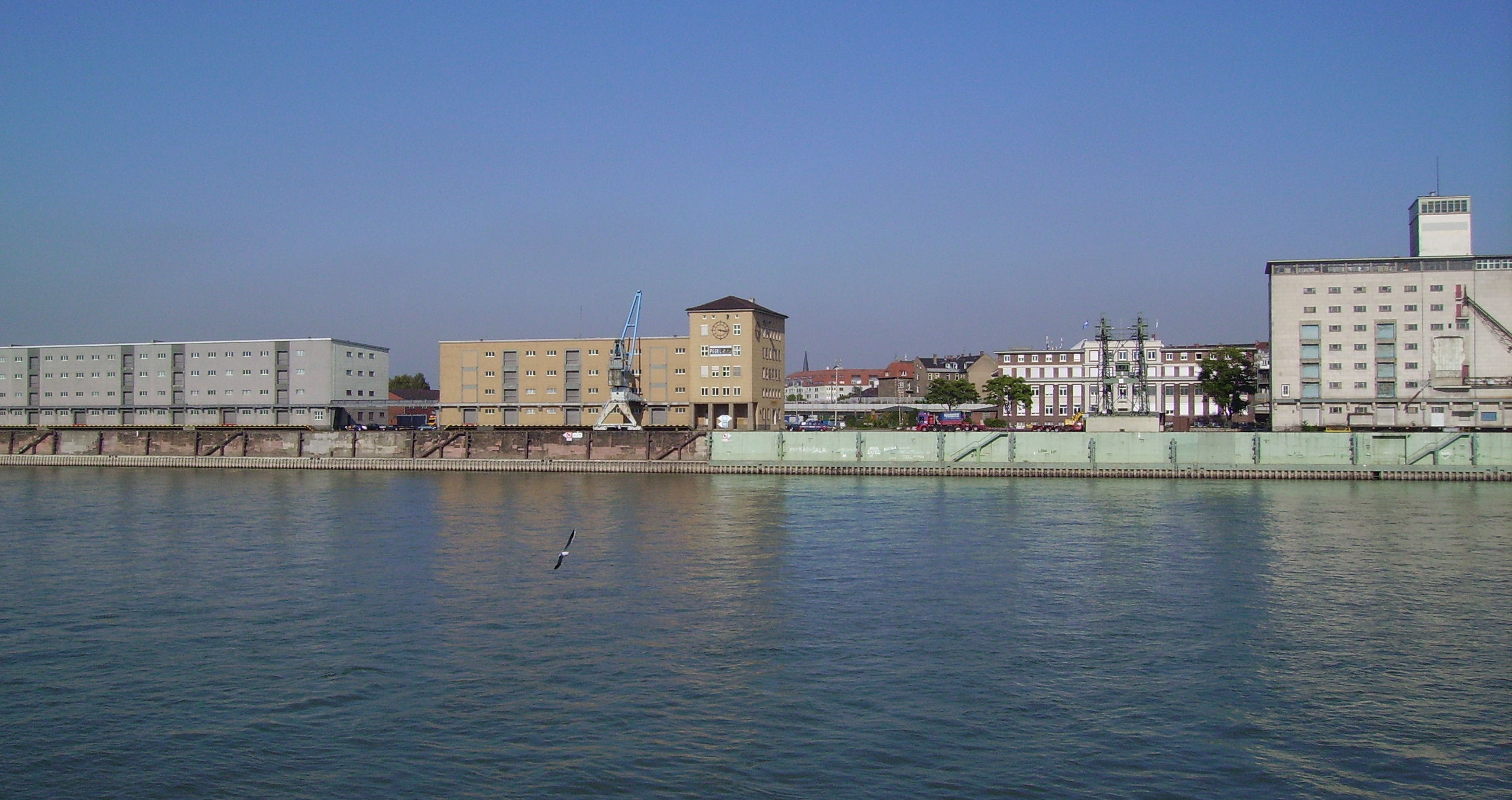 harbor of Mannheim in Baden-Württemberg (Germany)